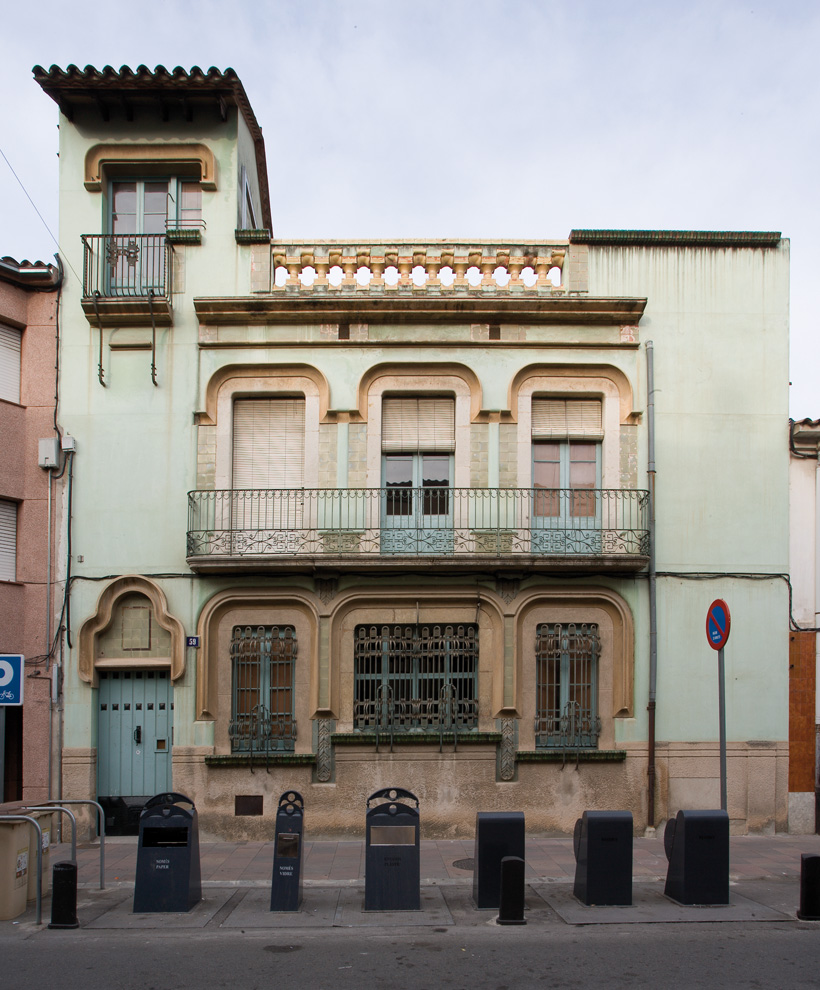 Escoles